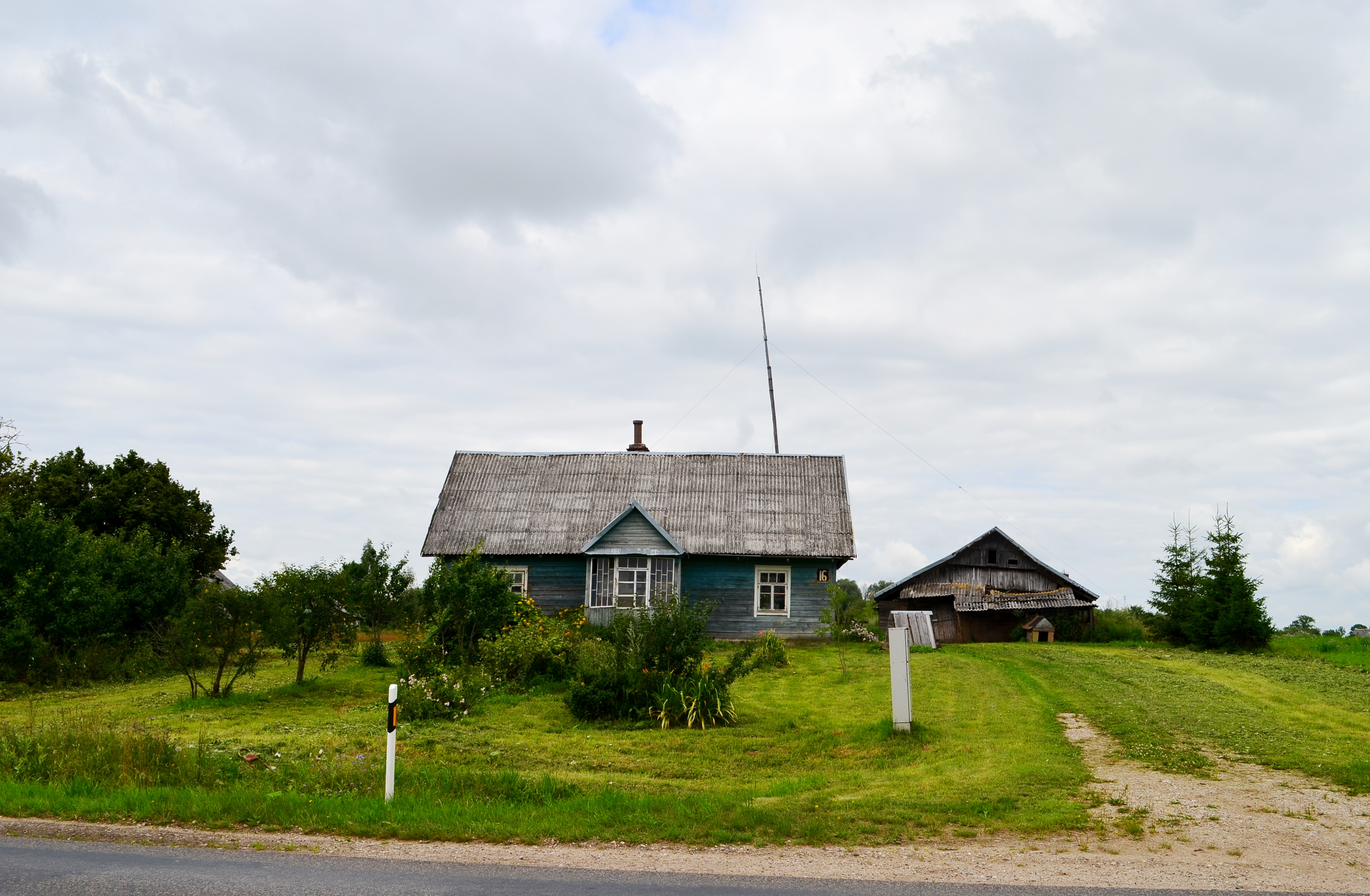 Kūtiškės k., N. Daugeliškio sen., Ignalinos raj.